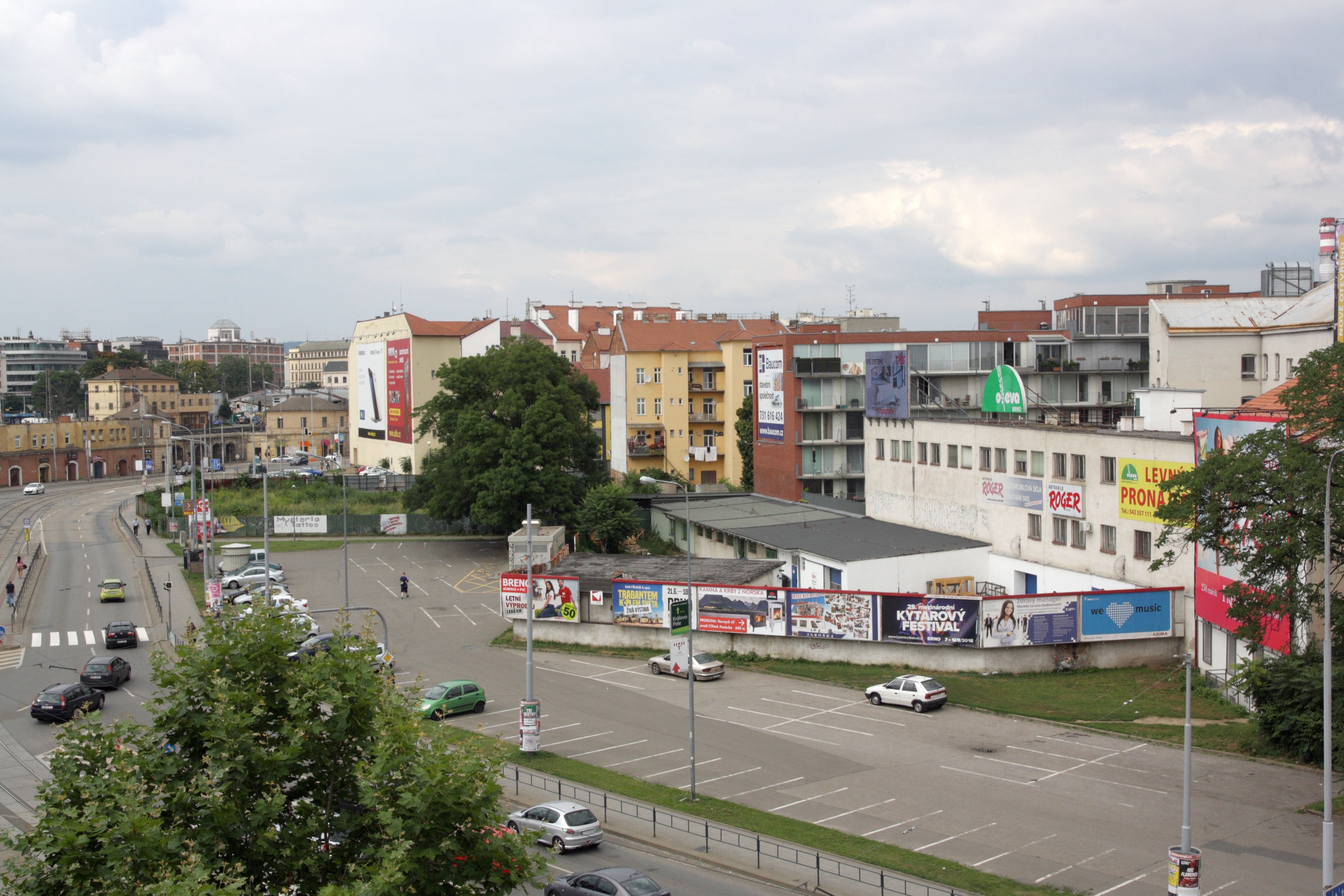 Brno - ul. Dornych, u křižovatky Úzká.